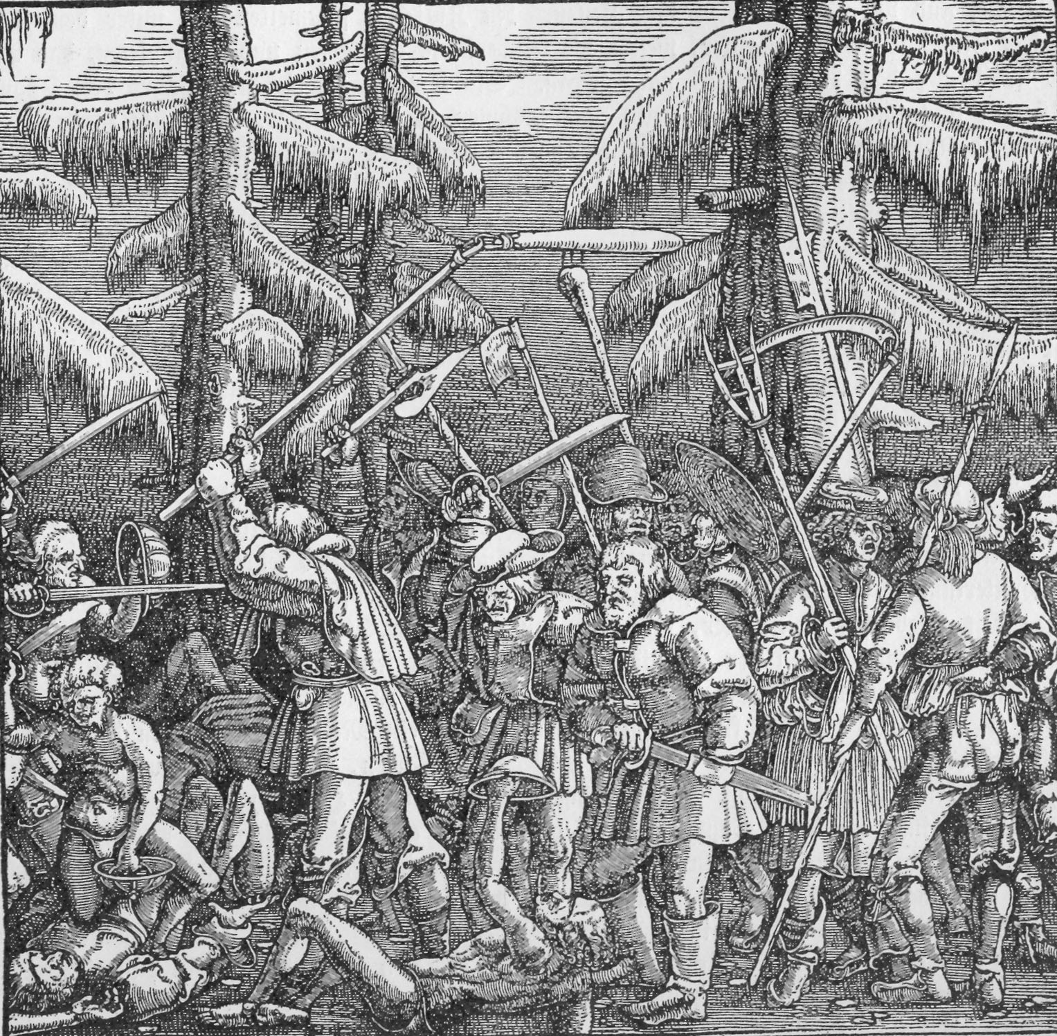 Kämpfende Bauern, Holzschnitt